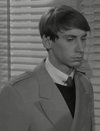 Gianni Dei in a scene of the film I due pericoli pubblici